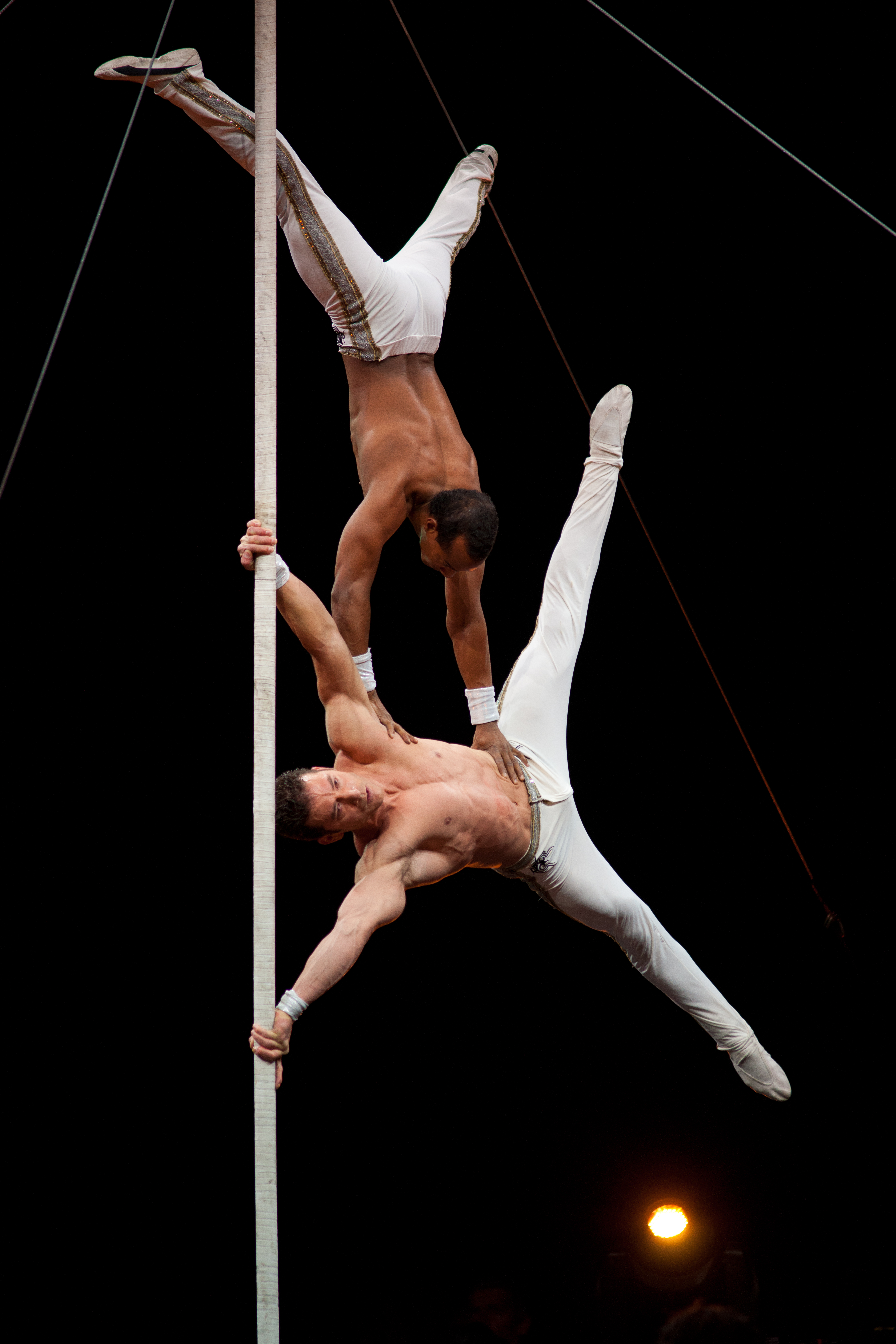 Leosvel et Diosmani artistes cubains au mât chinois. Six jours cyclistes de Grenoble 2011.